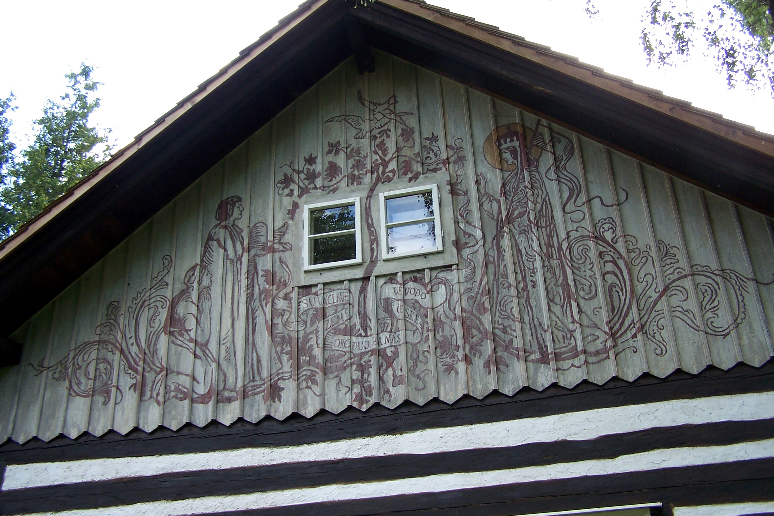 Chaloupka Maxe Švabinského v Kozlově